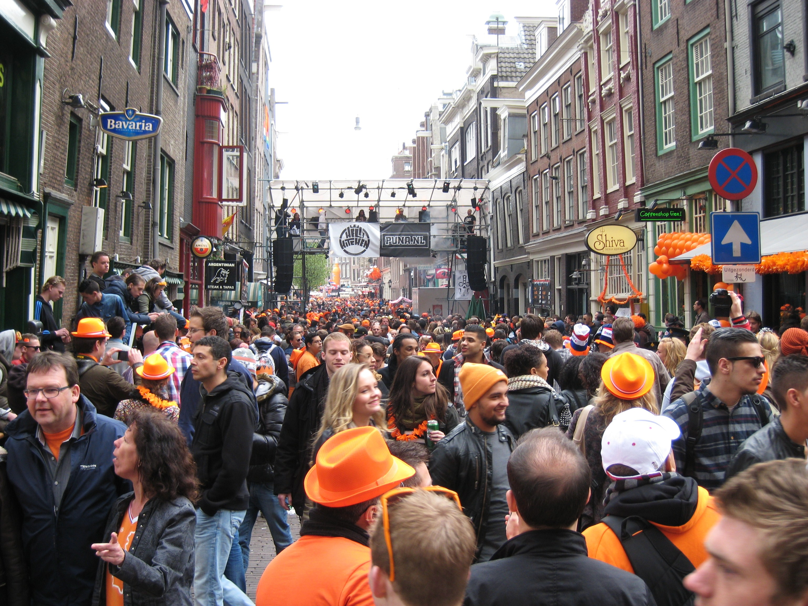 Fête à Amsterdam lors de l'intronisation de Willem-Alexander.